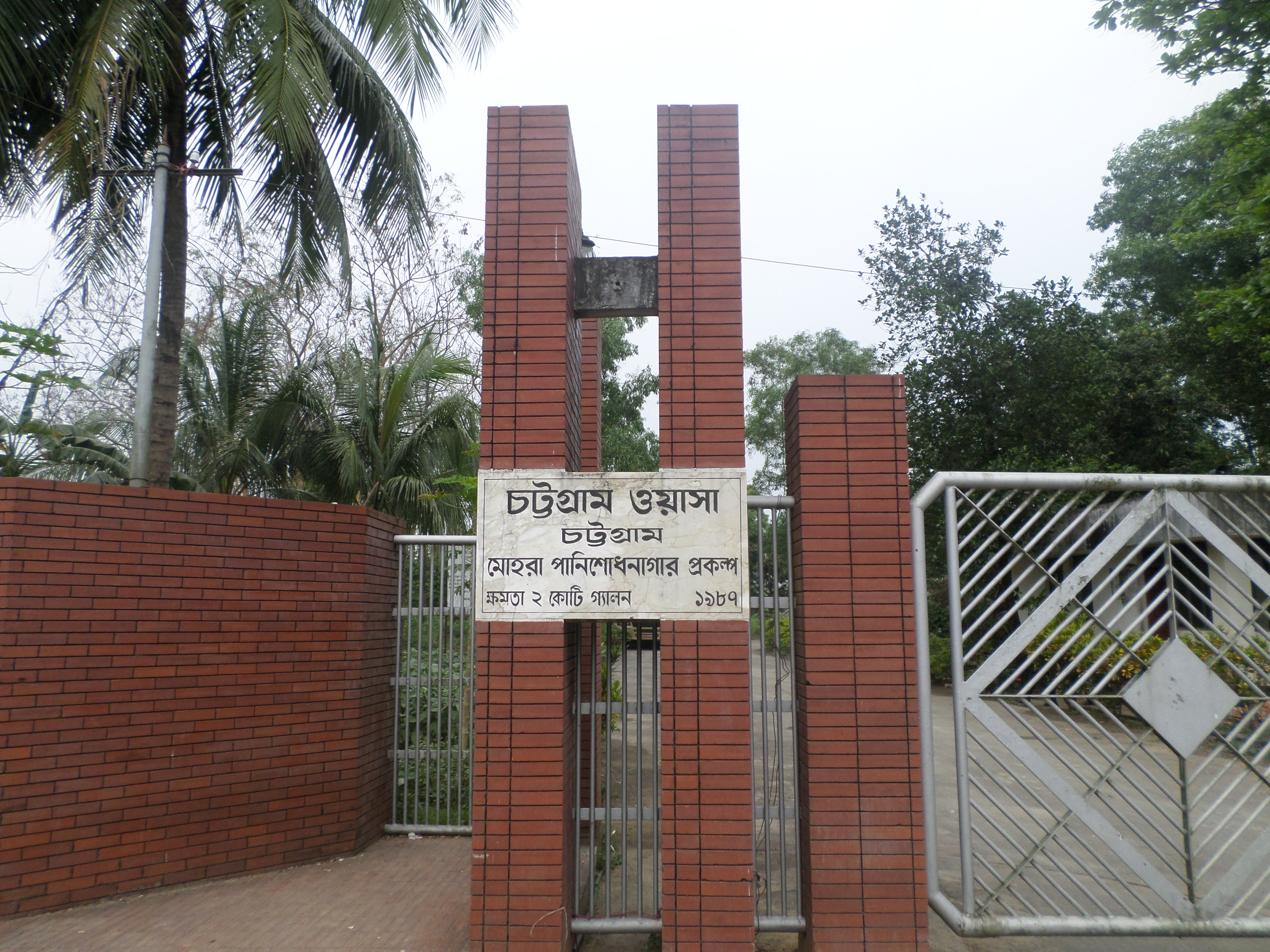 চট্টগ্রাম ওয়াসার মোহরা পানিশোধনাগার প্রকল্প।